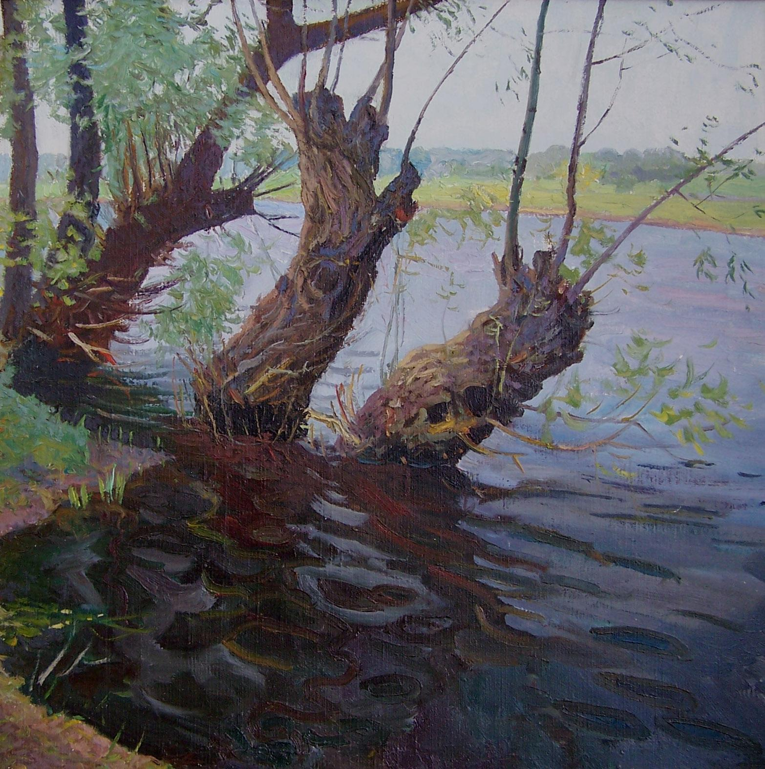 Три старые ивы, 1983.